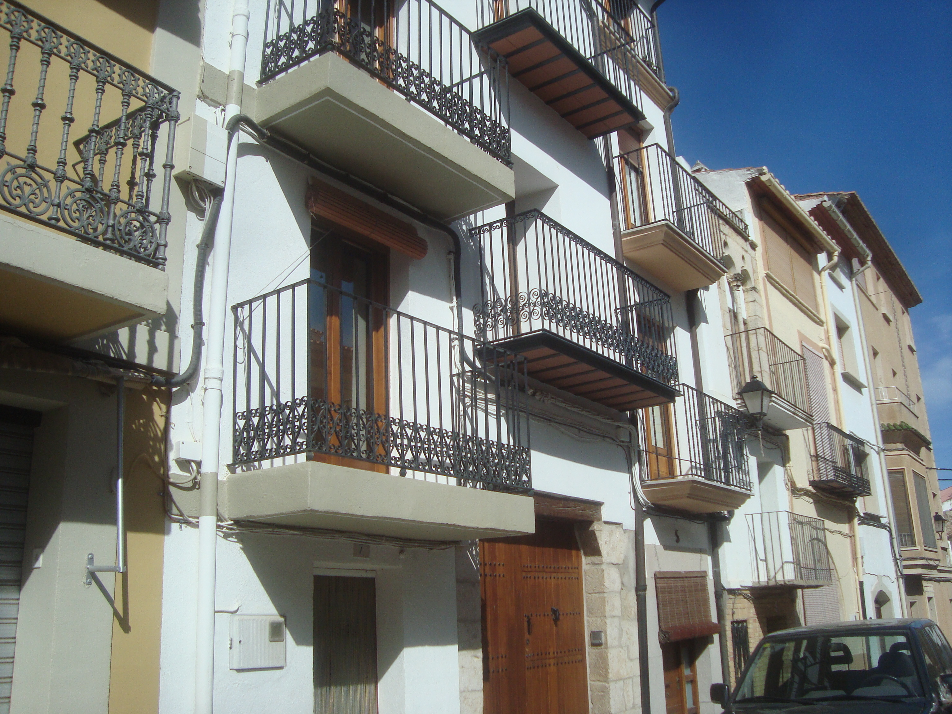 Catí (Castellón, España).